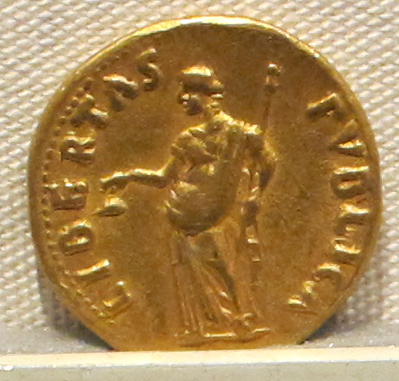 Palazzo Massimo alle Terme